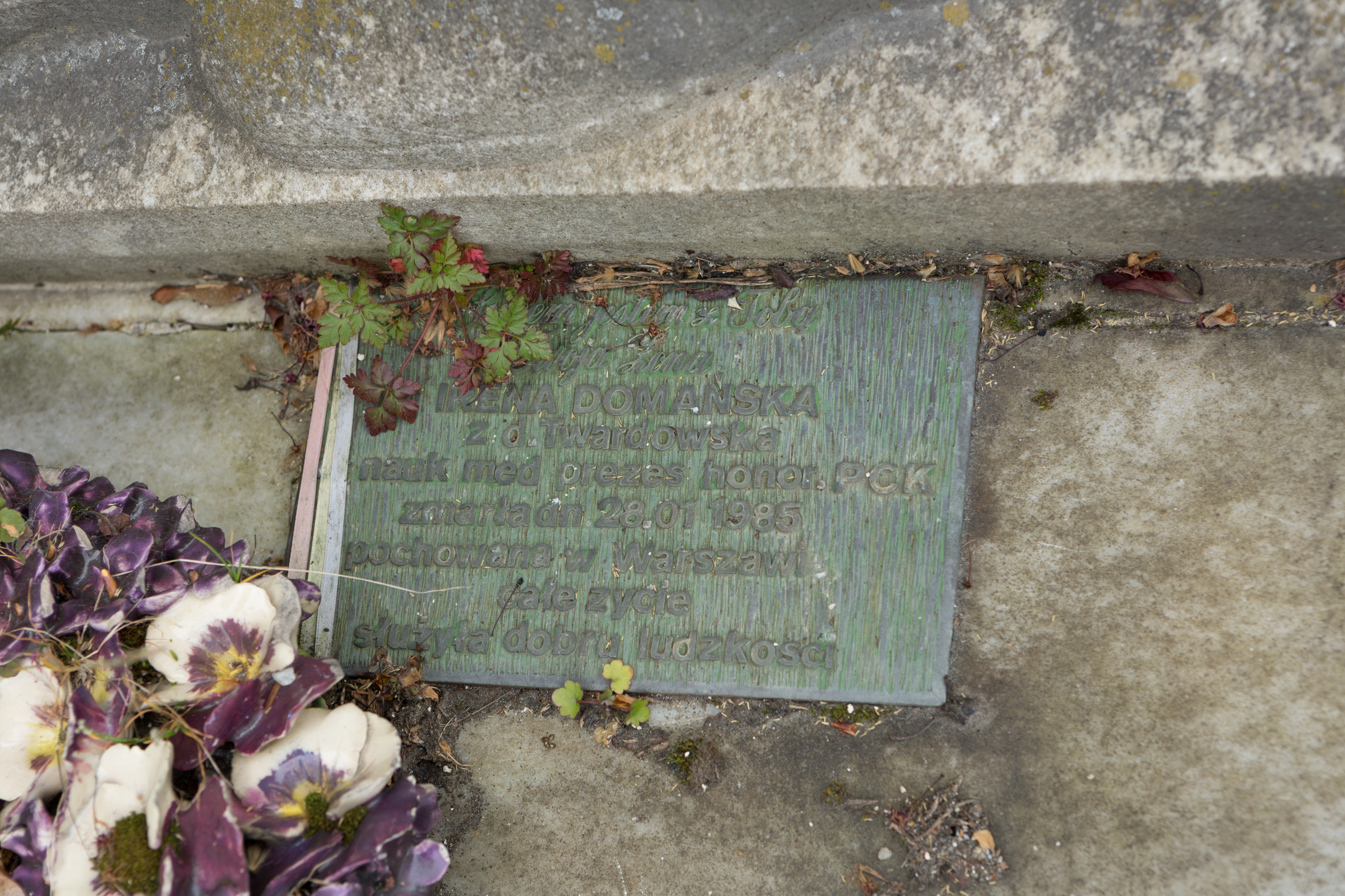 Sépulture de M. A Domanski Dubois (-1937), médecin membre des Brigades Internationales ; Irena Domańska (1903-1985), médecin et militante politique polonaise, membre du parti ouvrier unifié polonais.